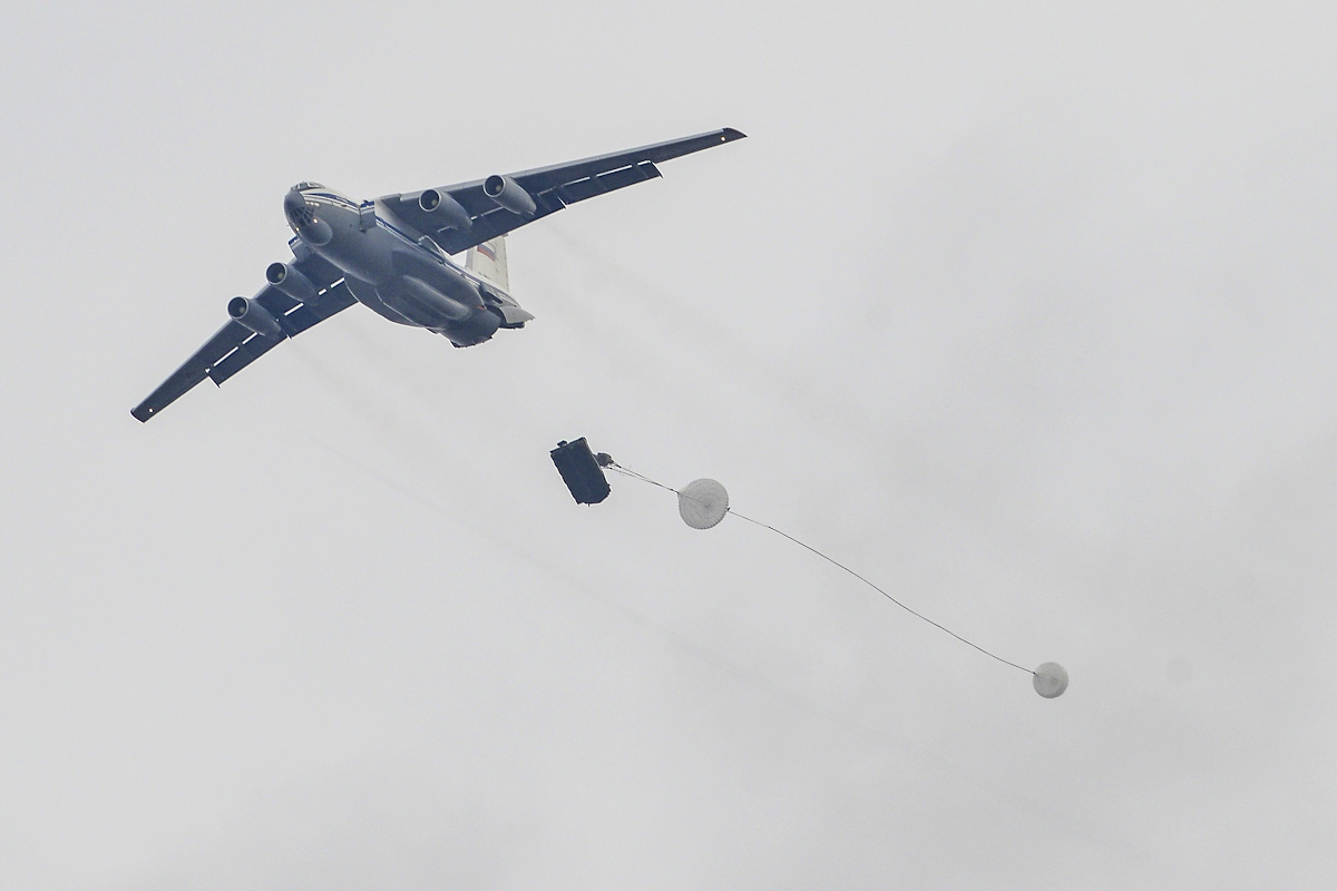 Активная фаза тактического учения с соединением ВДВ в Уссурийске.